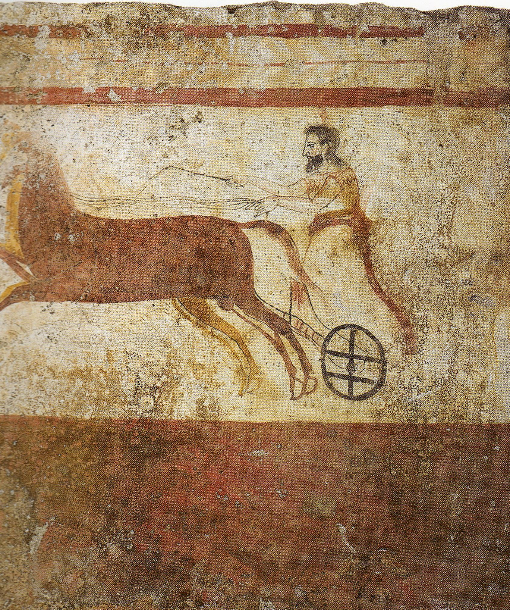 Paestum, Grab des bunten Hahnes. Detail